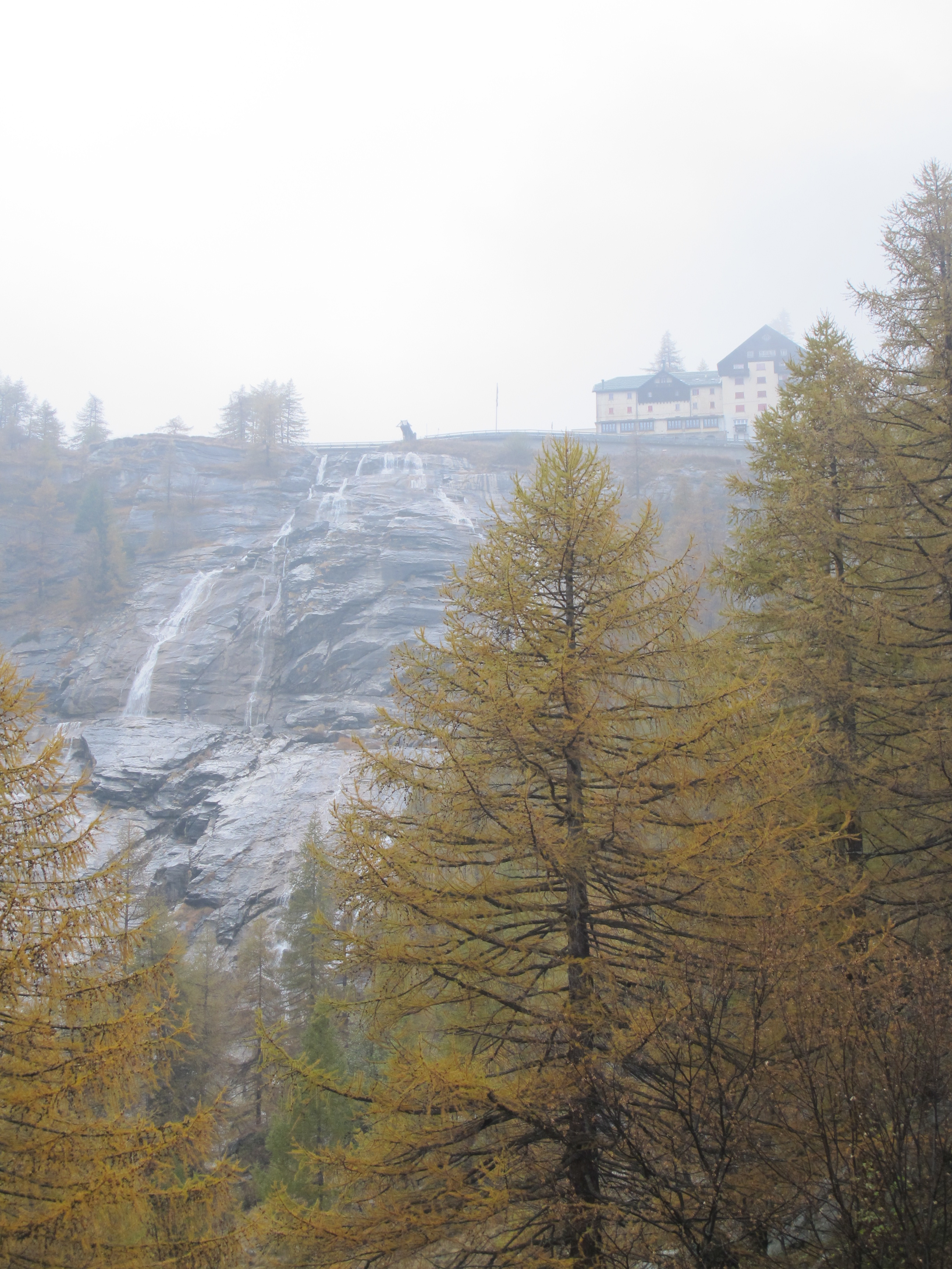 La Cascata del Toce in inverno.